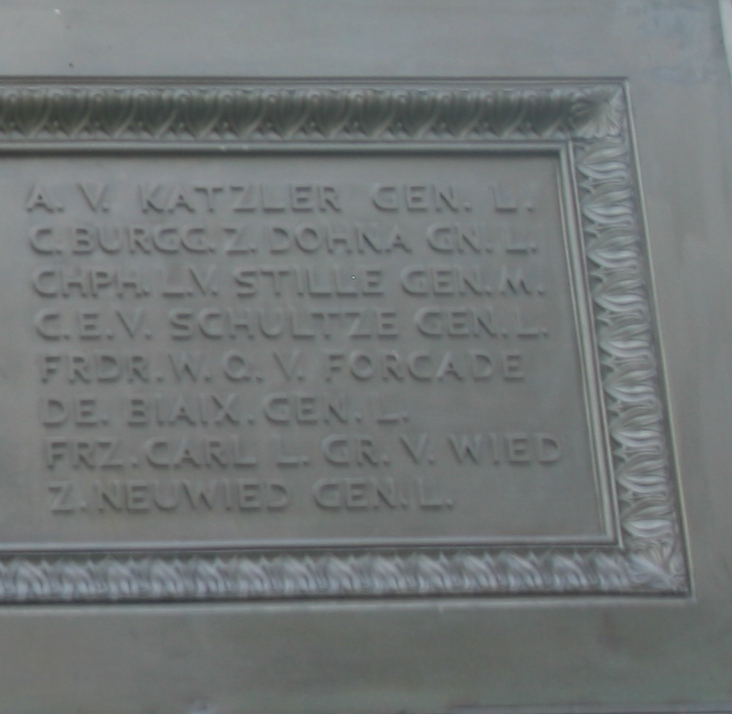 Reiterstandbild - Friedrich der Große - Nordansicht ( Details ) unten - Namenstafel - Rechts A. V. KATZLER GEN.L. ---------- Nikolaus Andreas von Katzler C.BURGG. Z. DOHNA GN.L. ------------ Christoph I. zu Dohna-Schlodien CHPH. L.V. STILLE GEN.M. ---------- Christoph Ludwig von Stille C.E.V. SCHULTZE GEN.L. ------- Kaspar Ernst von Schultze FRDR.W.C. V. FORCADE DE. BLAIX. GEN.L ----- Friedrich Wilhelm Quirin von Forcade FRZ.CARL L.GR. V. WIED Z.NEUWIED GEN.L. --- Franz Karl Ludwig von Wied zu Neuwied Quelle der Links : wiki Berlin - Unter den Linden ( Mittelpromenade ) Baudenkmal ( LDA ) Landesdenkmalamt - Berlin Dok Nr. 09060118 LDA Info wiki Reiterstandbild Friedrichs des Großen